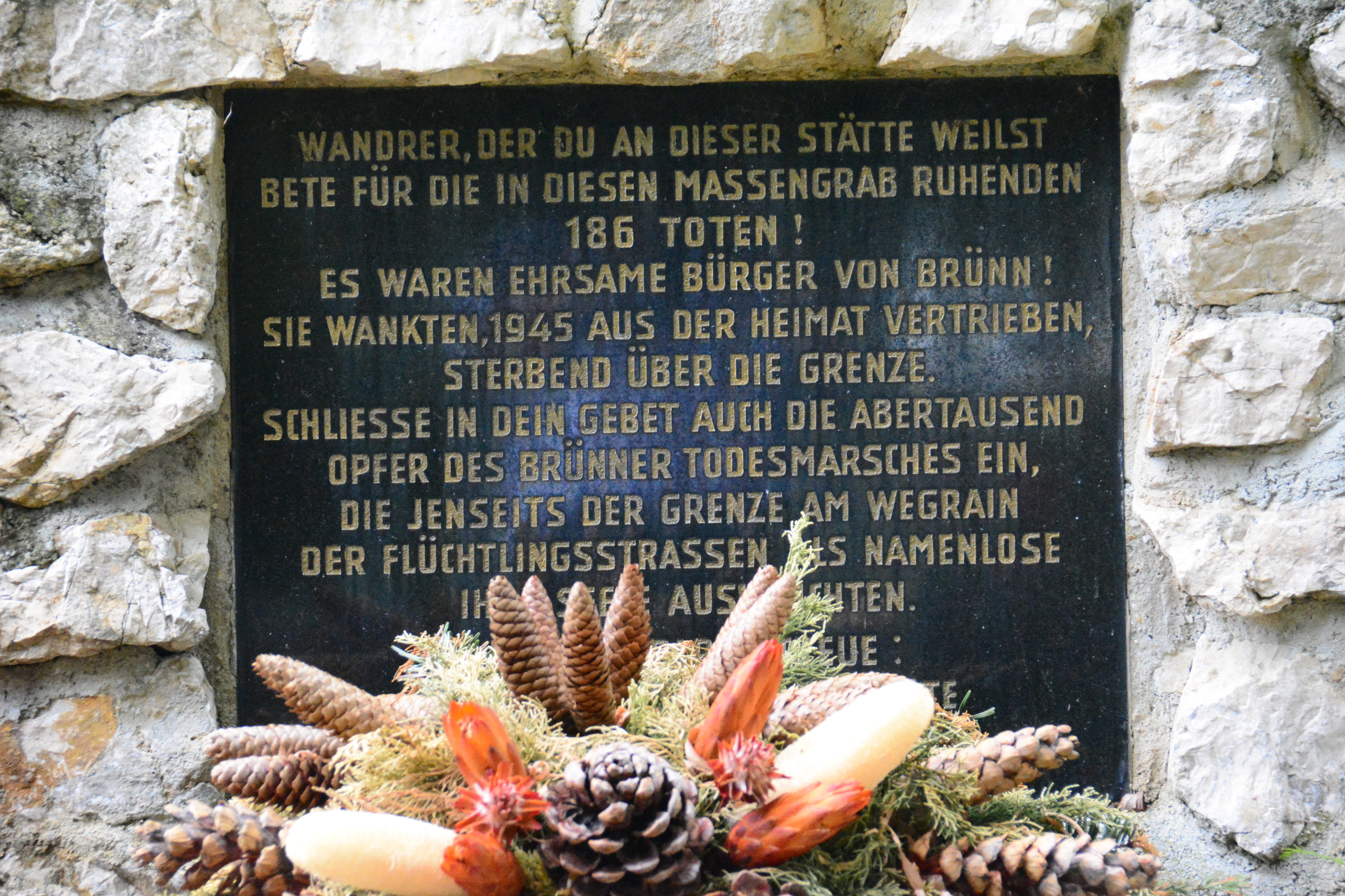 Massengrab für 186 Opfer des Brünner Todesmarsches im Jahr 1945 auf dem Ortsfriedhof von Drasenhofen in Niederösterreich